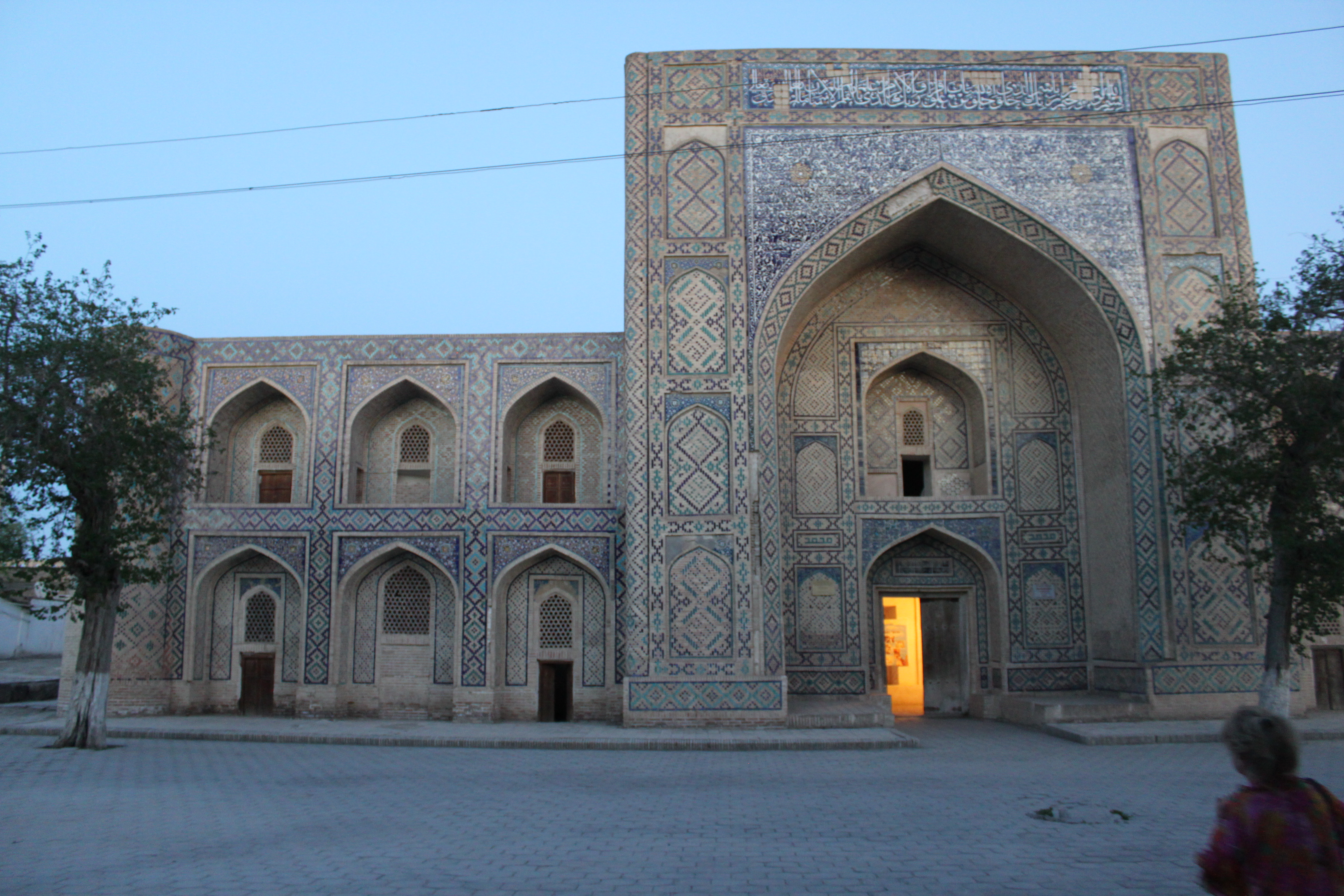 Vue extérieure de la madrasa madra i khan